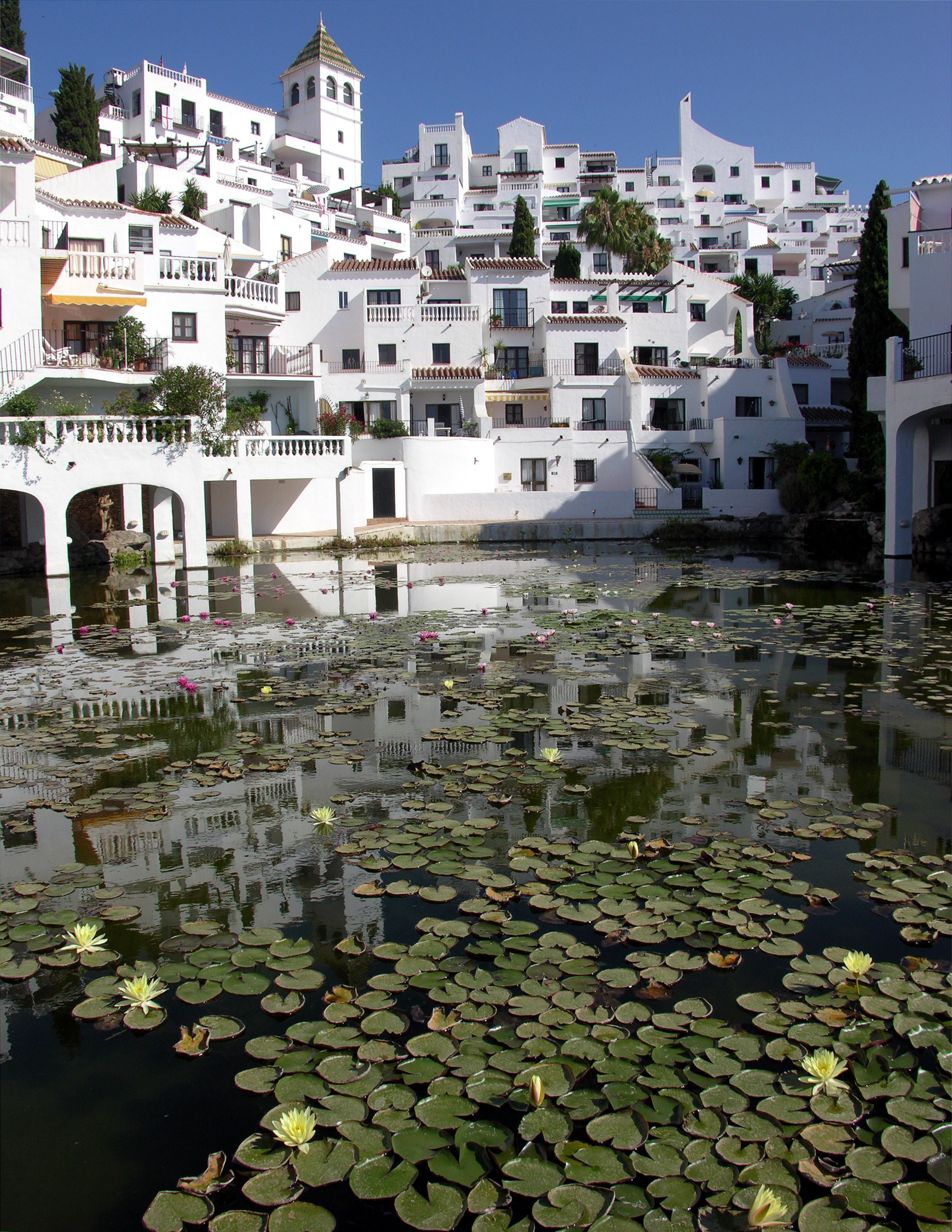 Wohnanlage Capistrano, Nerja Spanien,erstellt 25.Juni 2006 von Peter Lorber